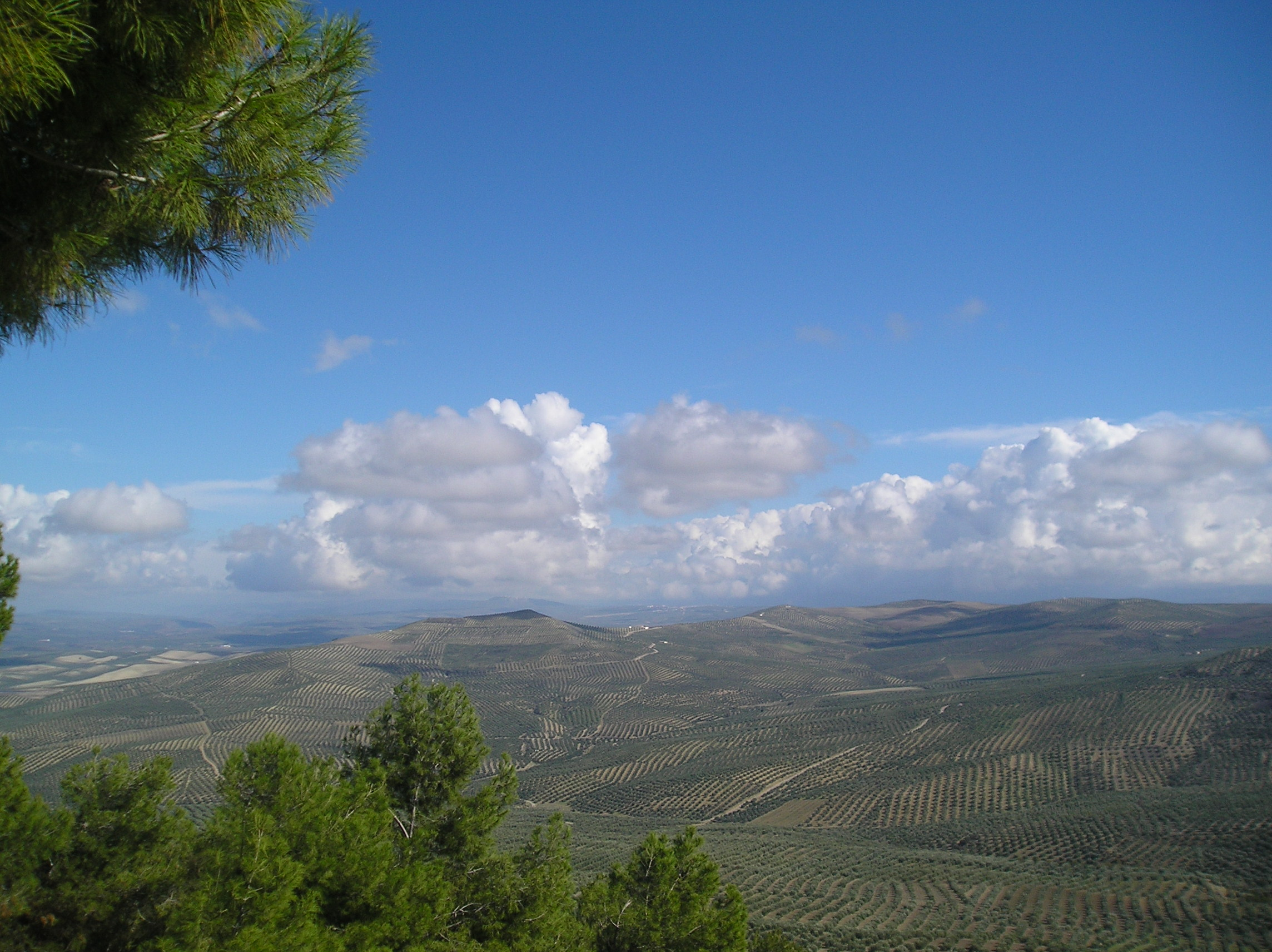 Vista de los campos de olivos desde Sabiote